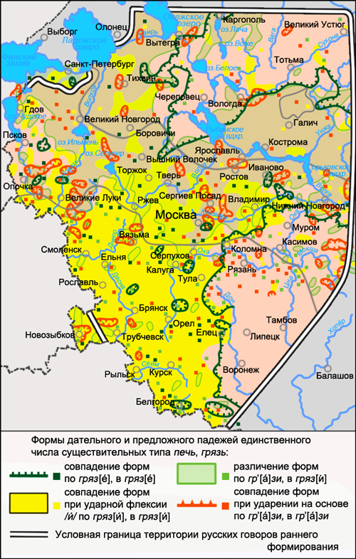 Карта распространения диалектного явления русского языка в области морфологии: формы дательного и предложного падежей единственного числа существительных типа печь, грязь. Источники: Захарова К. Ф., Орлова В. Г., Сологуб А. И., Строганова Т. Ю. Образование севернорусского наречия и среднерусских говоров / Ответственный редактор В. Г. Орлова. — М.: «Наука», 1970. — С. 74 (Карта 16. Формы дательного—предложного падежей ед. ч. существительных типа печь, грязь.)